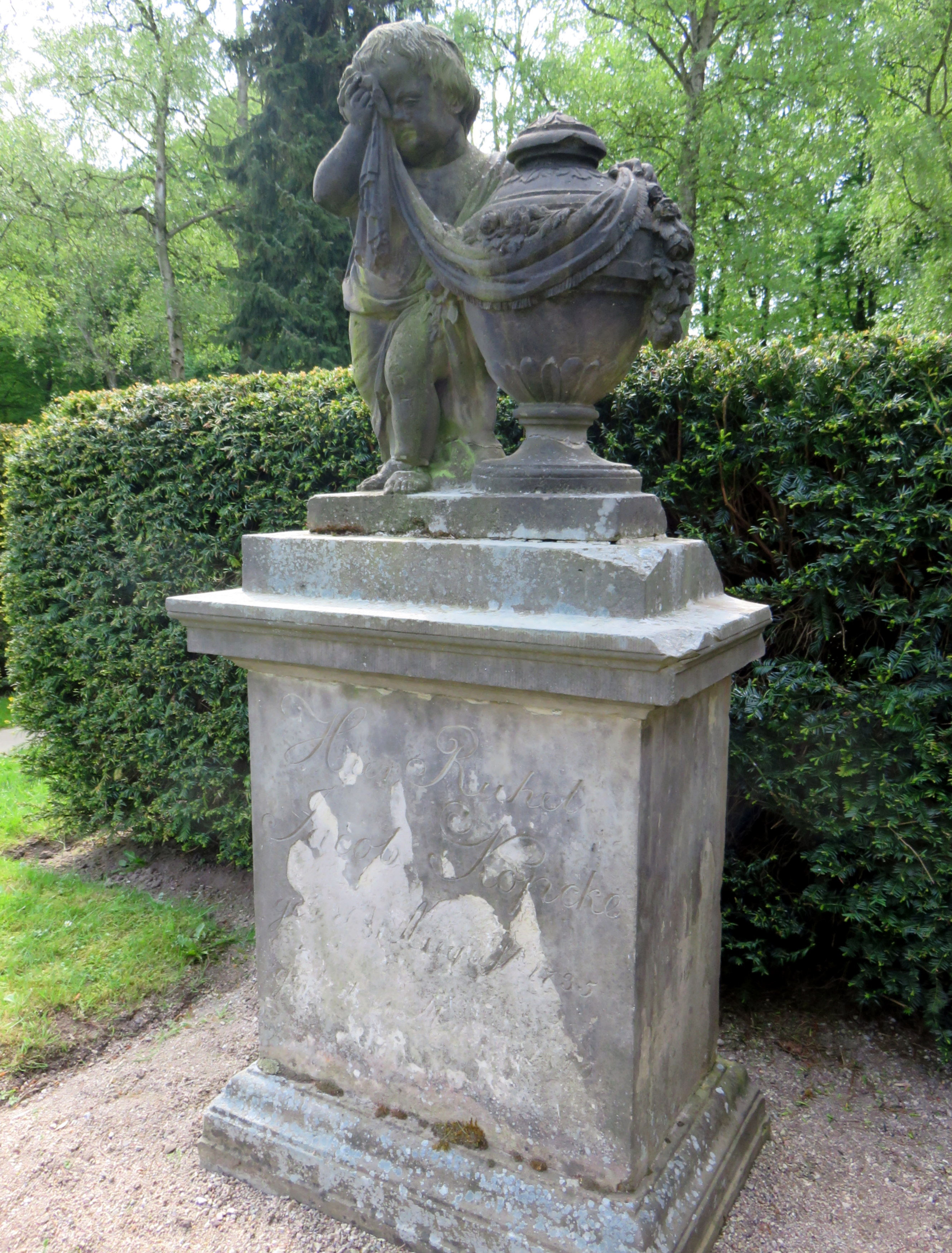 Sandstein-Grabmal von 1810 für den Hamburger Kaufmann Jacob Köpcke (1735-1810) im Grabmal-Freilichtmuseum Heckengarten auf dem Hamburger Friedhof Ohlsdorf.